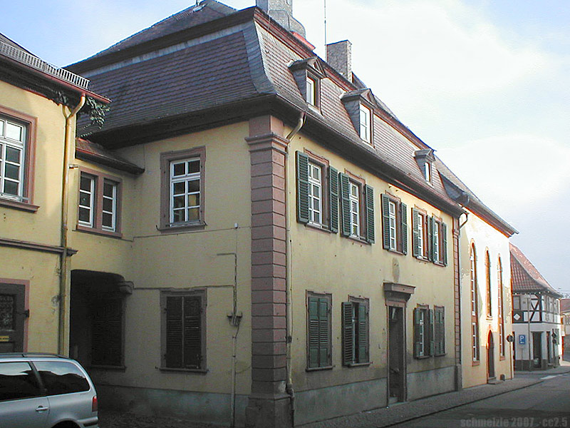 Altes Rathaus in Osthofen, Rheinland-Pfalz, Deutschland